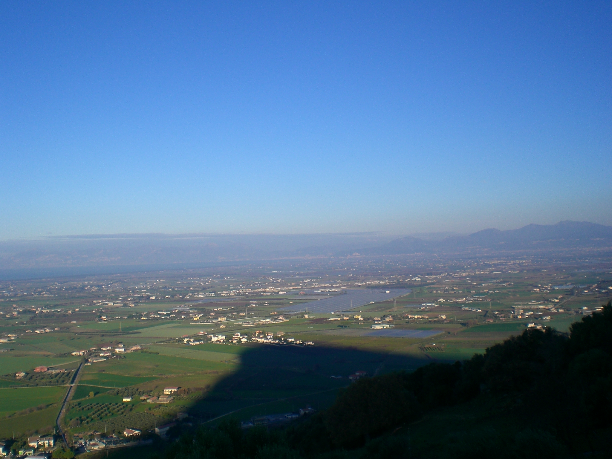 Piana del Sele vista dal monte Calpazio.